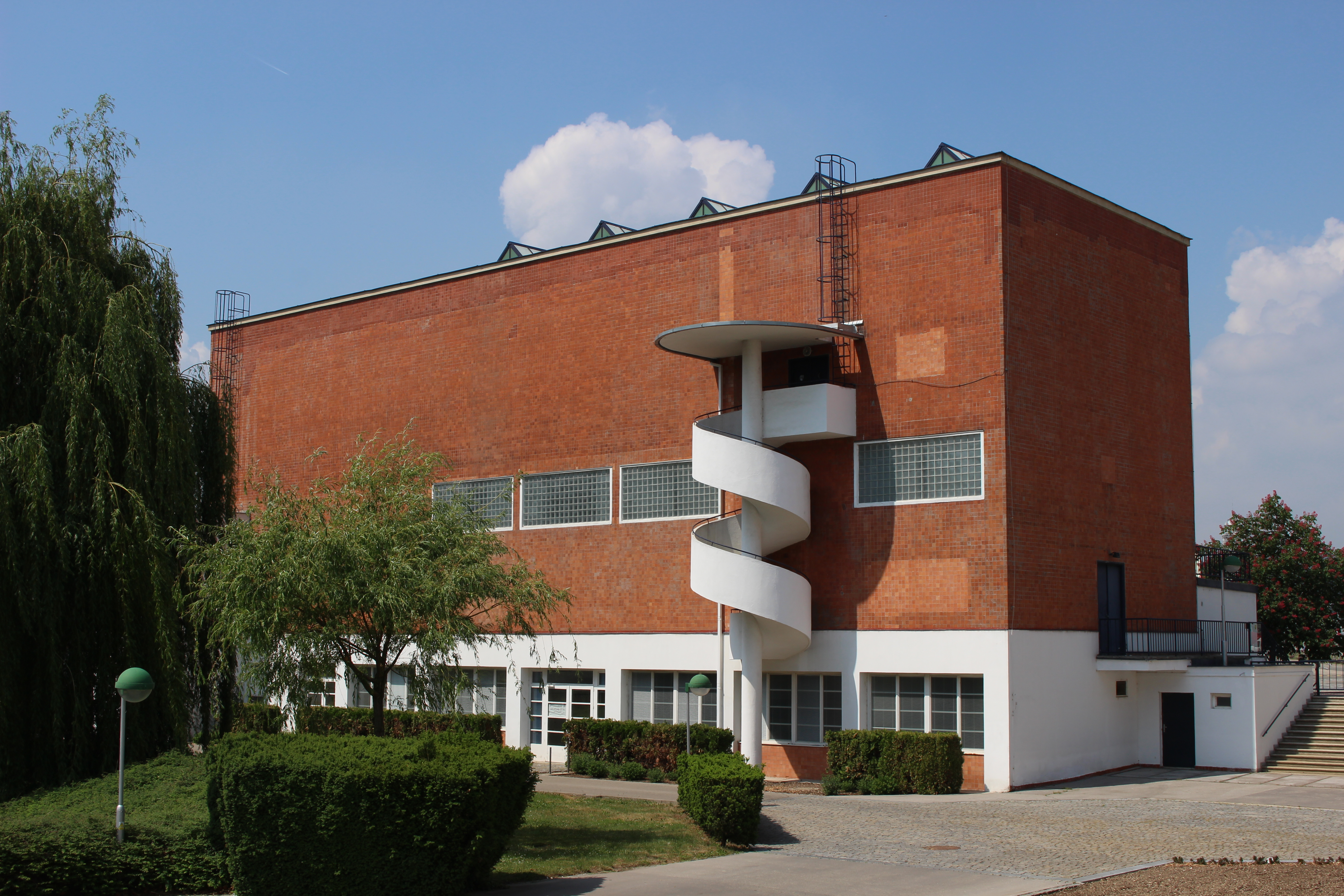 Pavilon Brno, Brněnské výstaviště